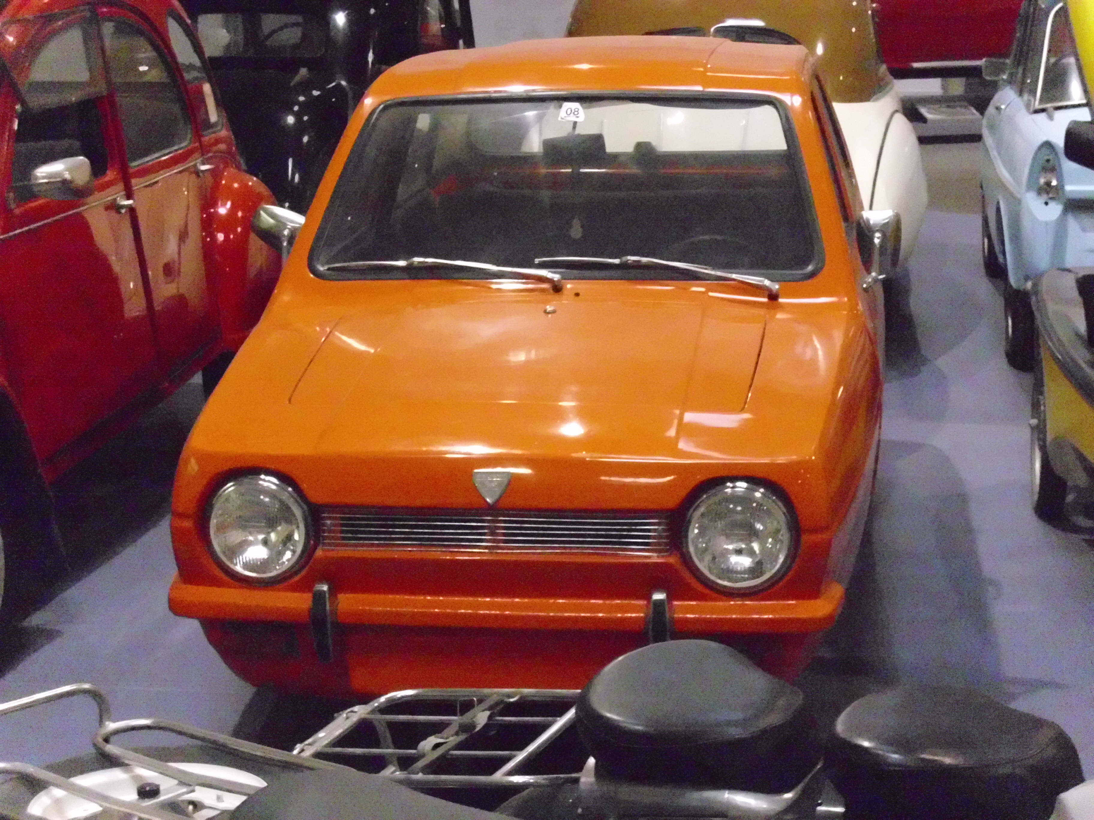 MEBEA Robin Dreirad von 1974–1978 im Noesis-Technikmuseum in Thessaloniki.